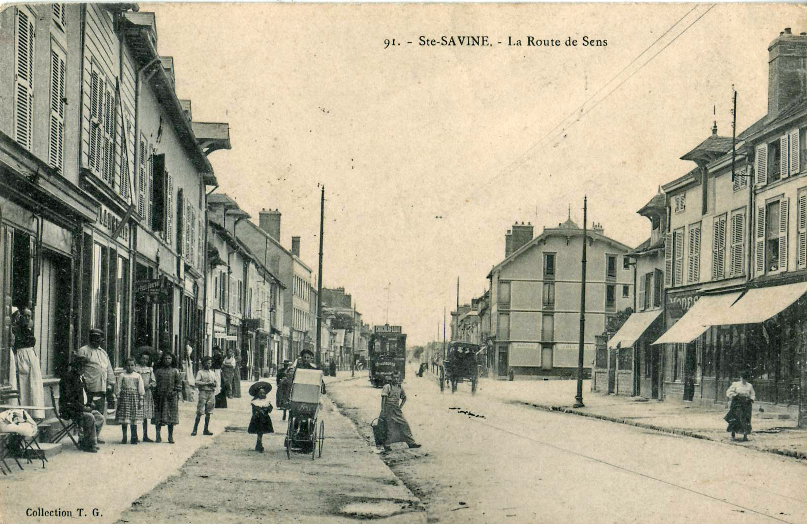 Carte postale ancienne éditée par Collection T. G., n°91 : SAINTE-SAVINE - La Route de Sens